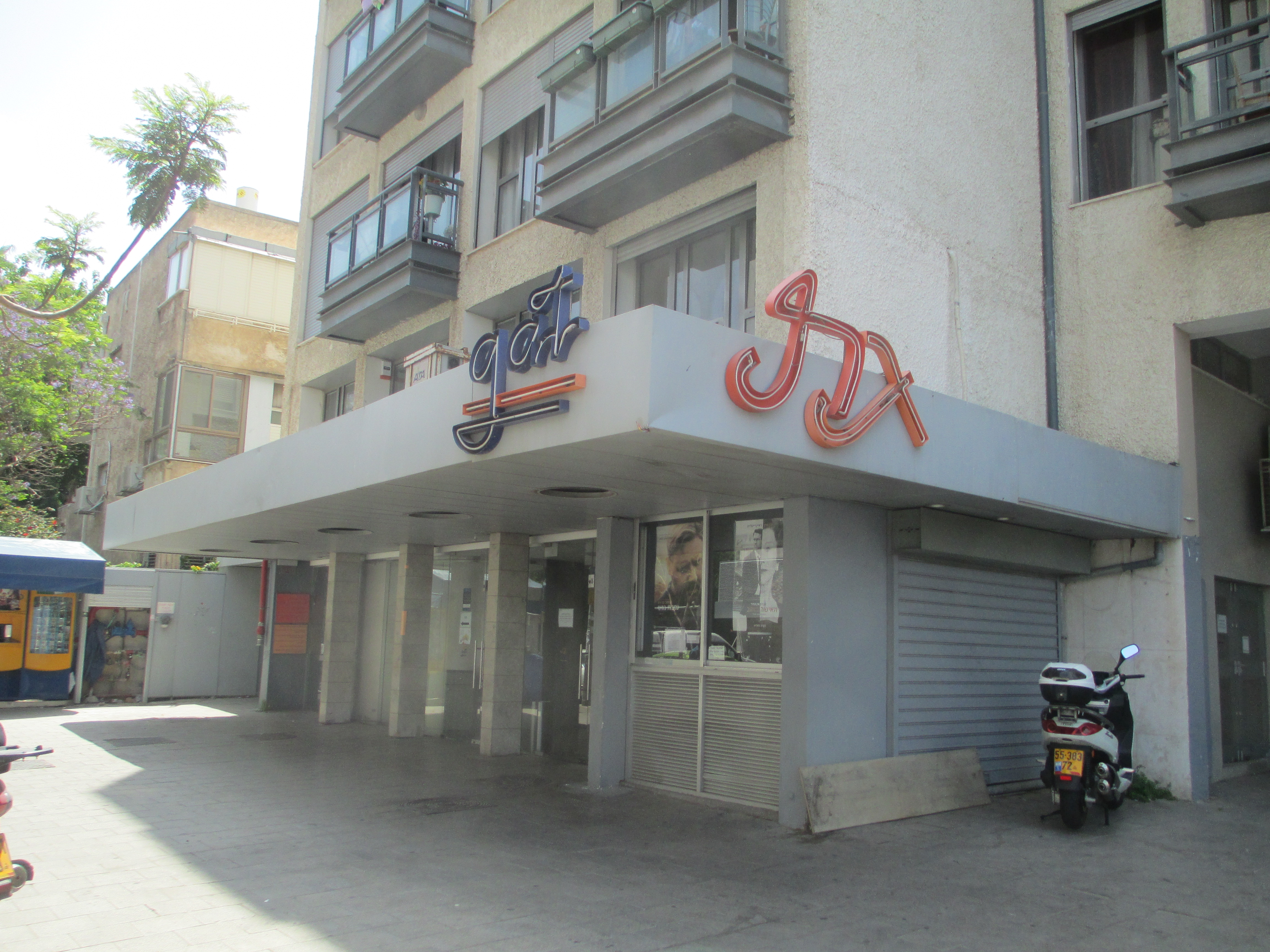 קולנוע גת בתל אביב